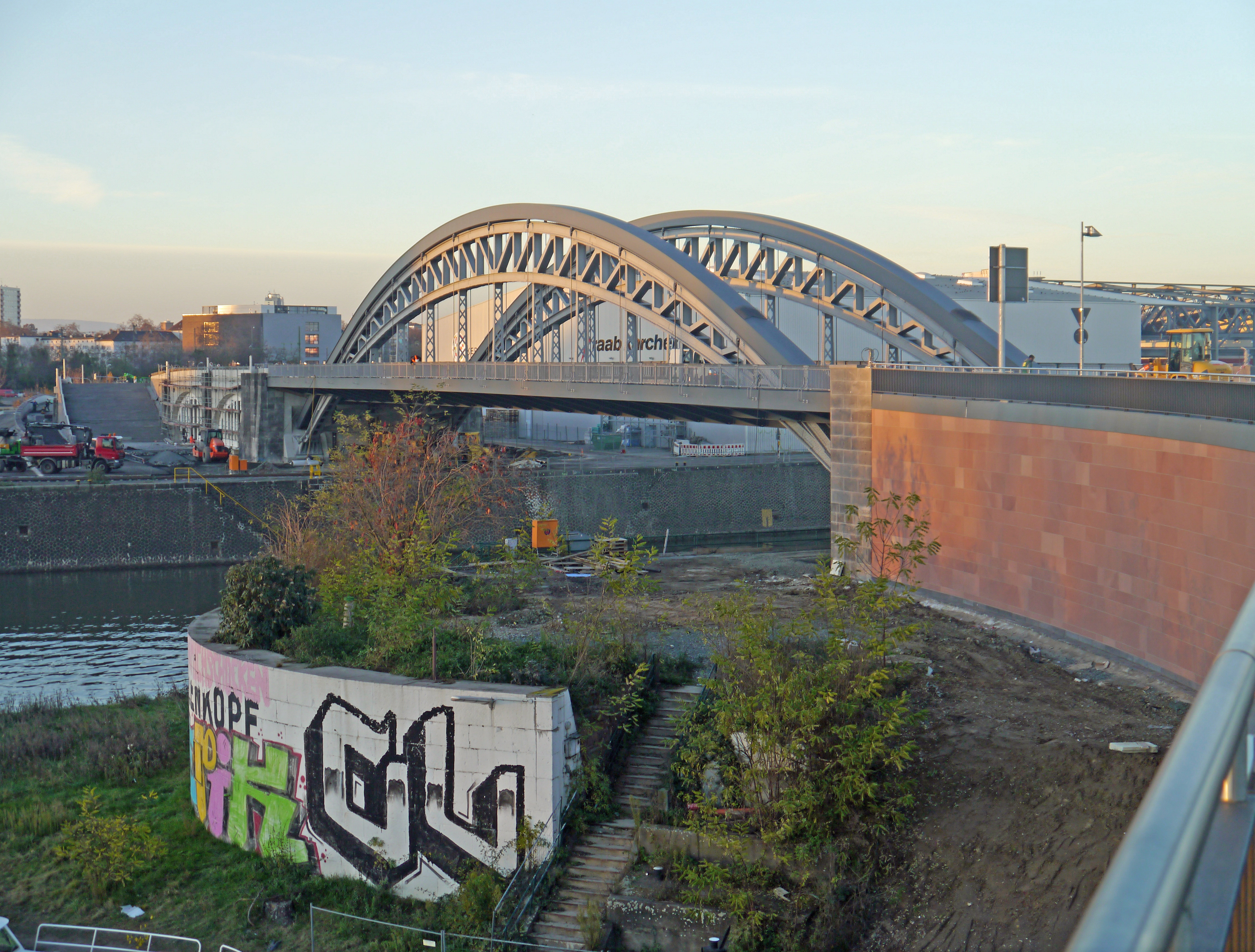 Die Honsellbrücke im November 2013, kurz vor ihrer Fertigstellung. Gesehen von der Osthafenbrücke in Frankfurt am Main.